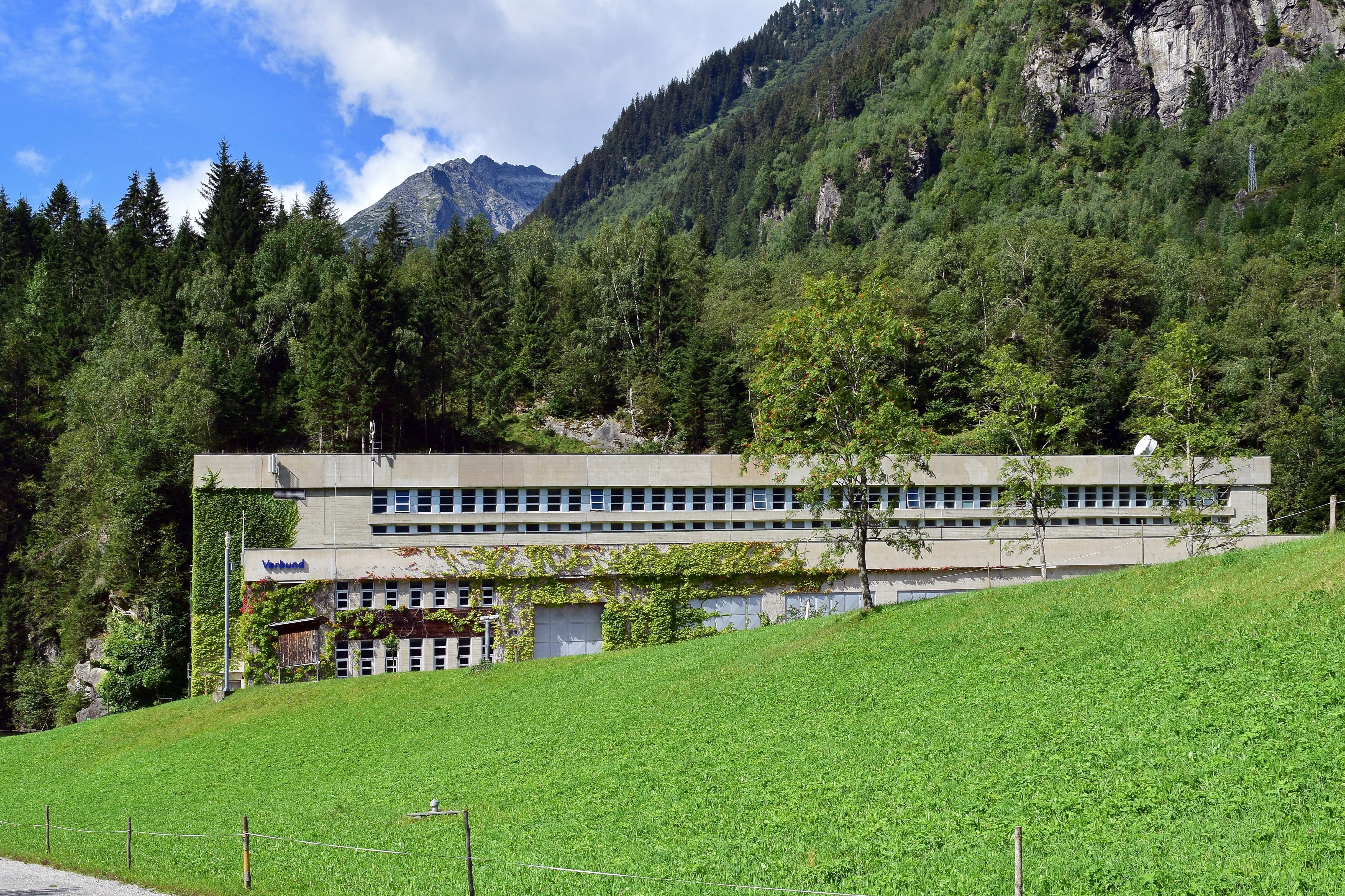 Das zur Kraftwerksgruppe Zemm-Ziller gehörende Pumpspeicherkraftwerk Roßhag